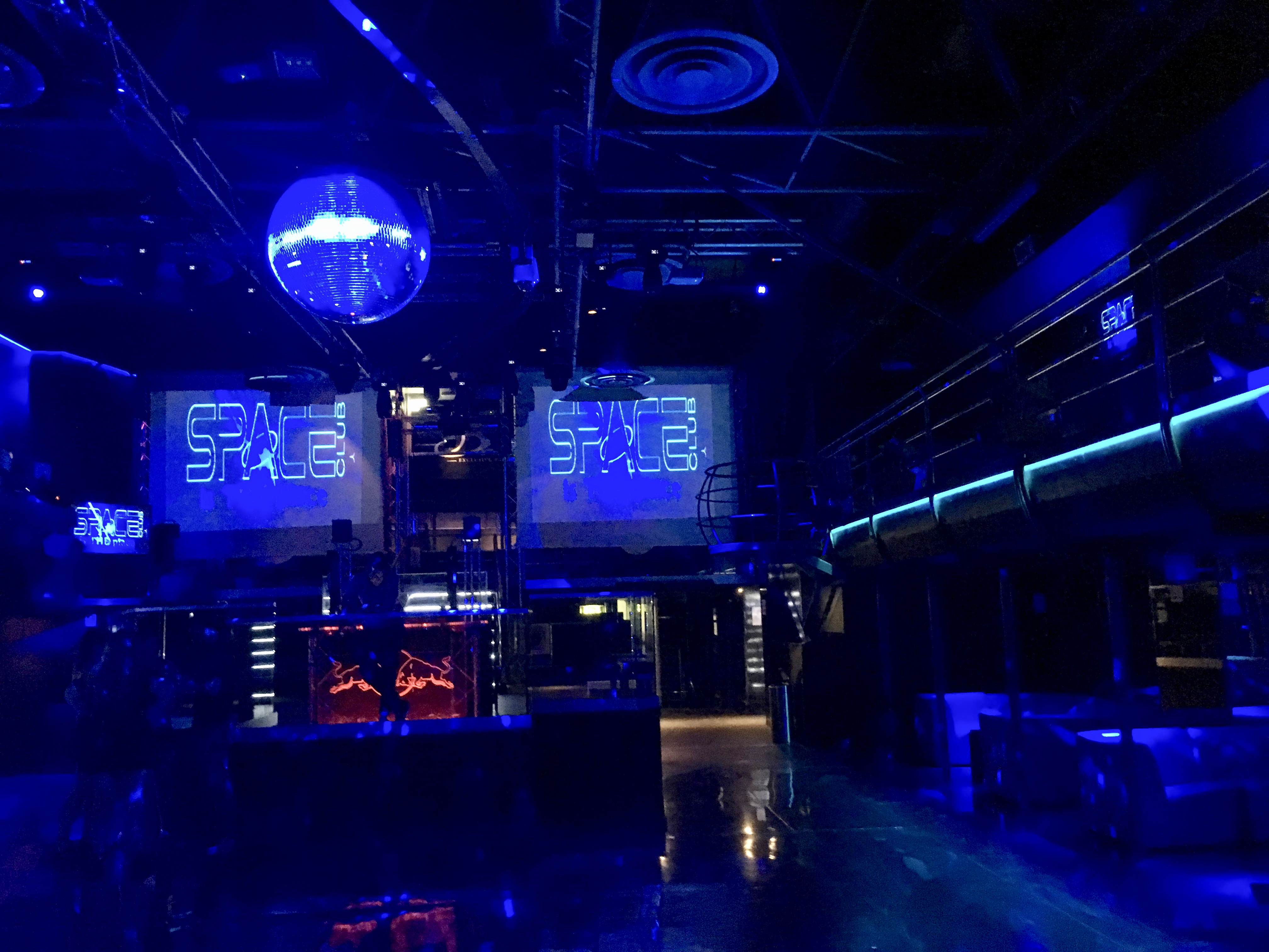 Space Electronic, discoteca di Firenze